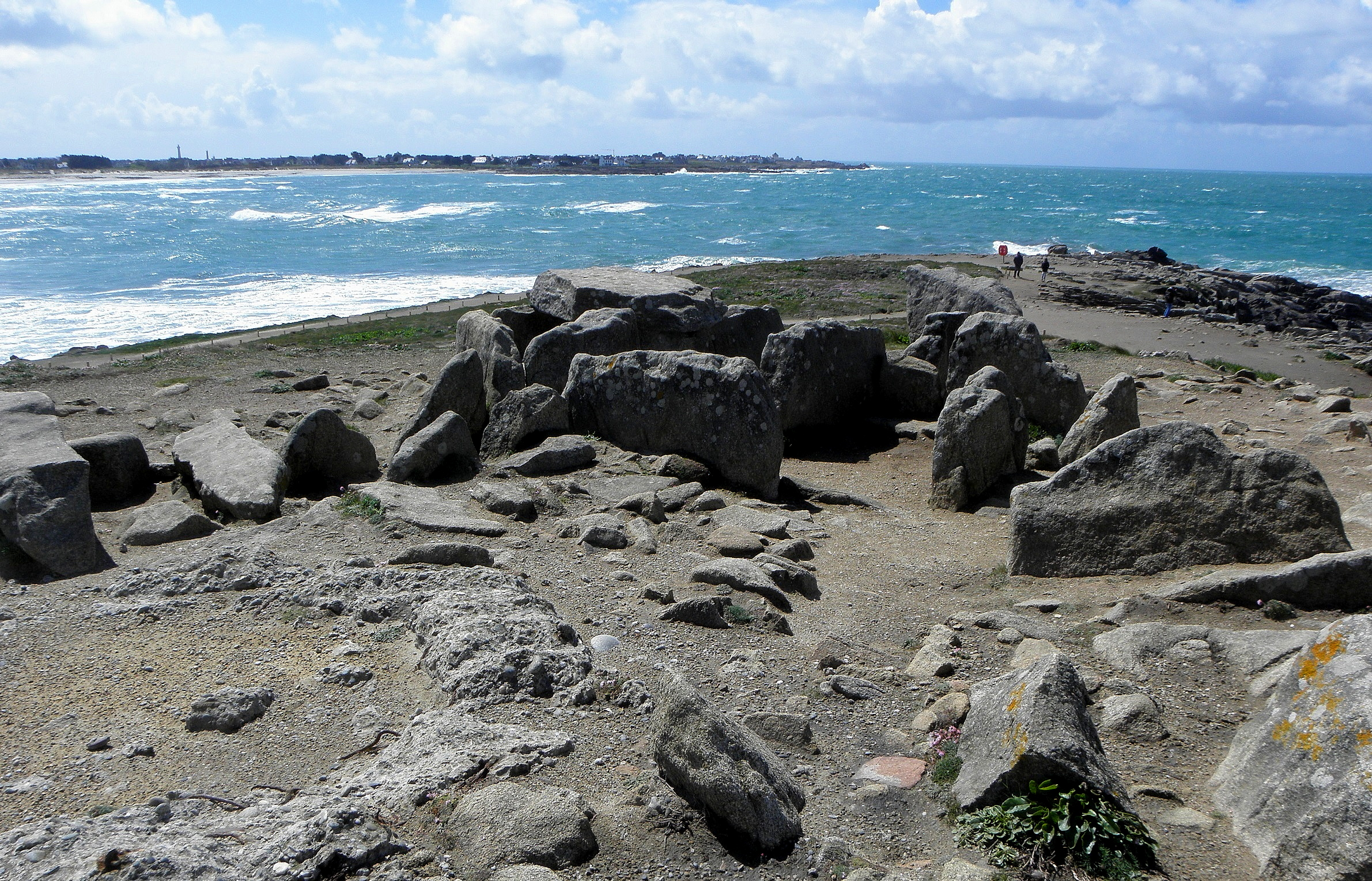 Allée couverte de la Pointe de la Torche en Plomeur (29).